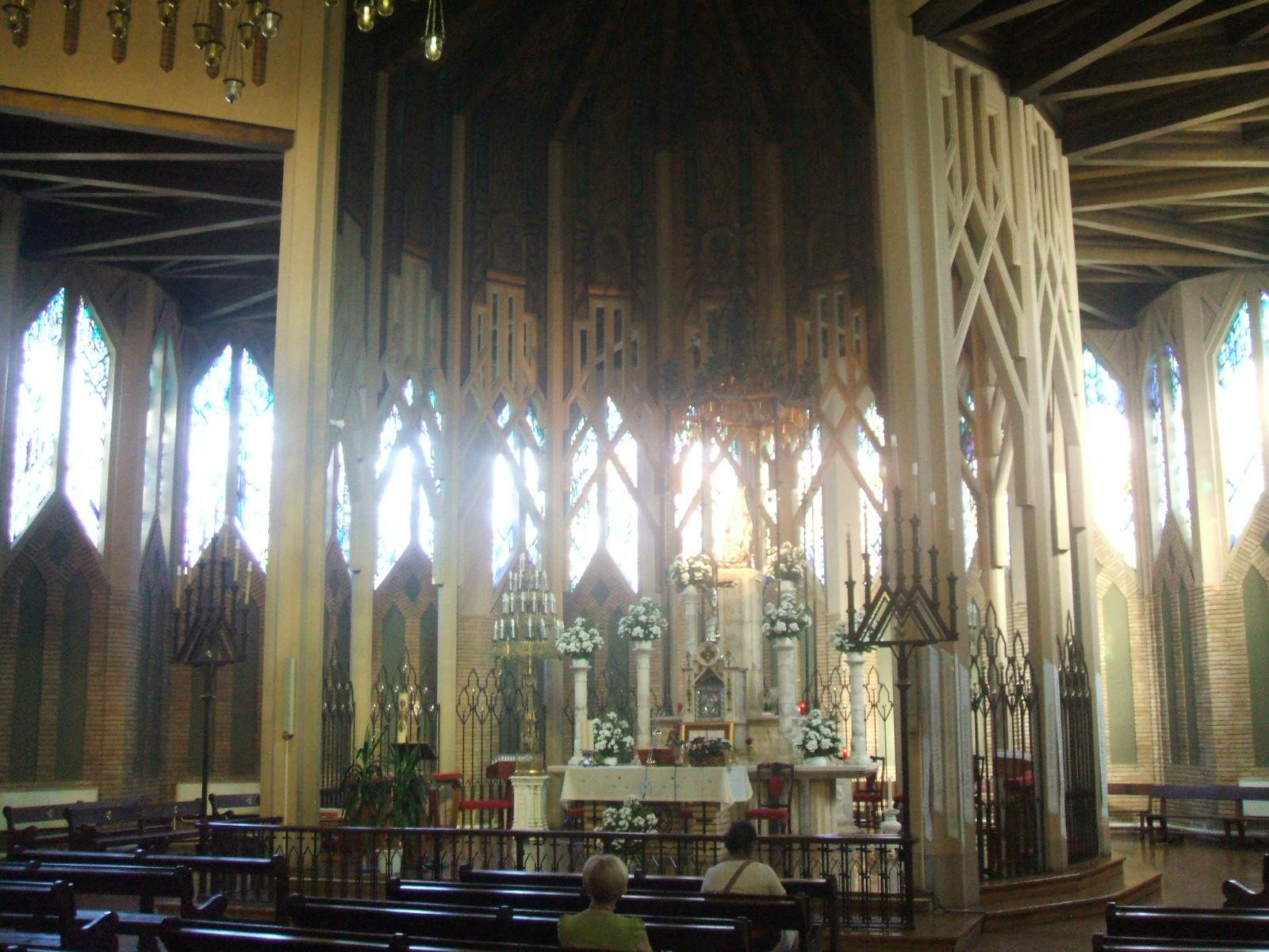 Basílica de Nuestra Señora del Puy (Estella)